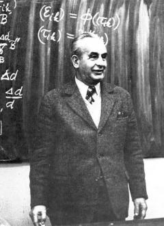 Alois Zátopek (1907 – 1989), český geofyzik